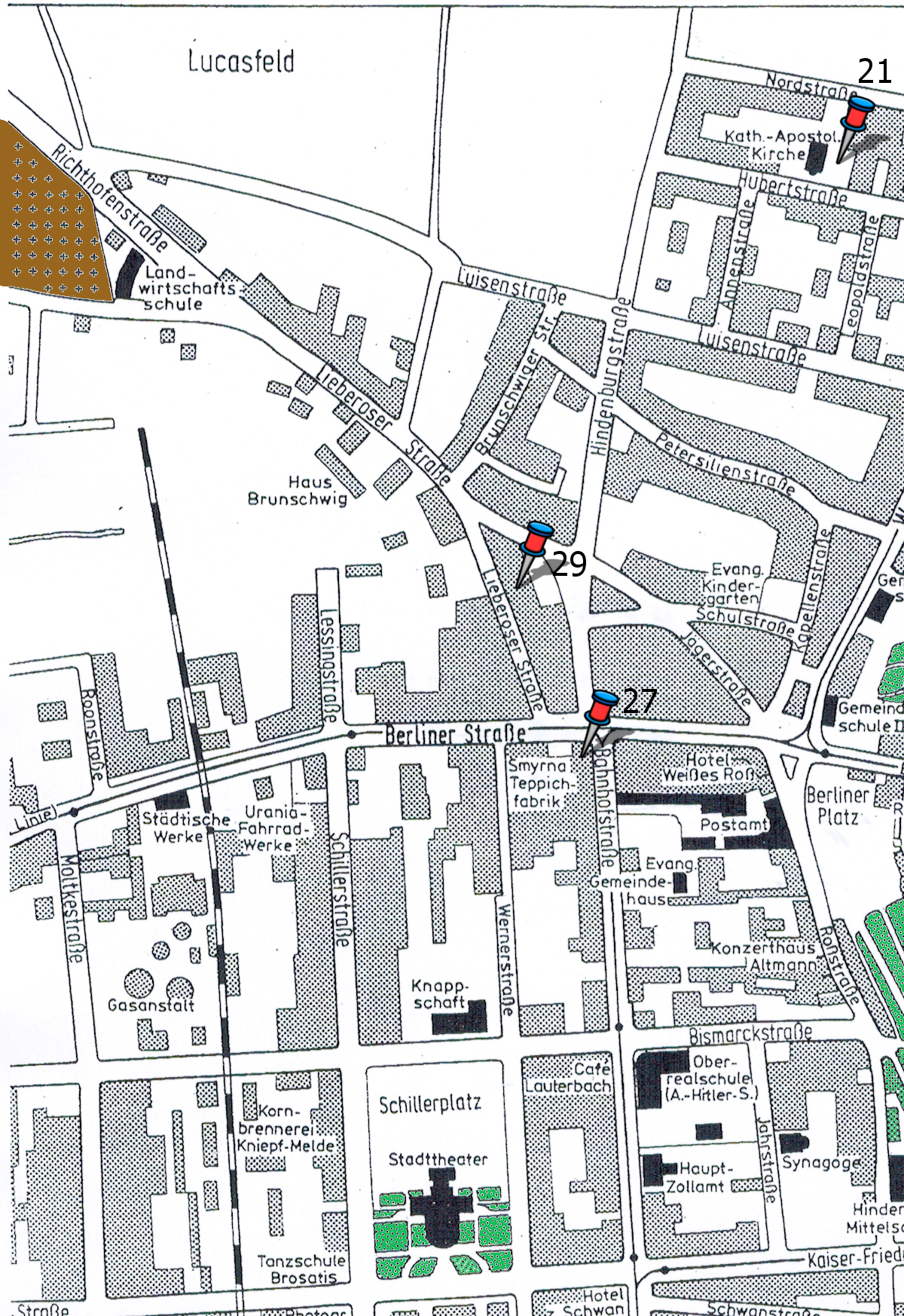 Stadtkarte 1938 1.1